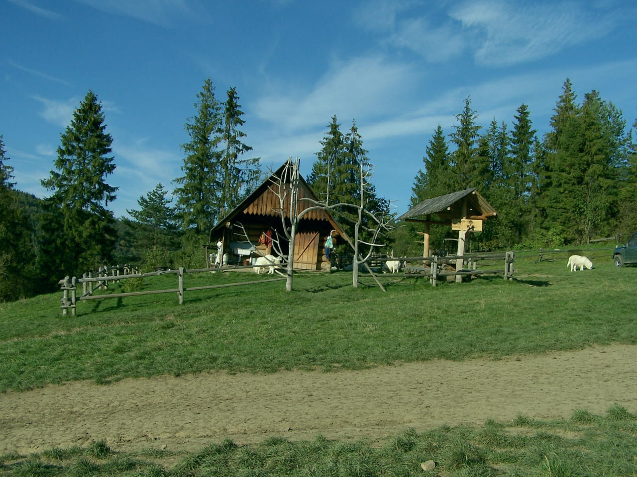 Biała Woda (Małe Pieniny)